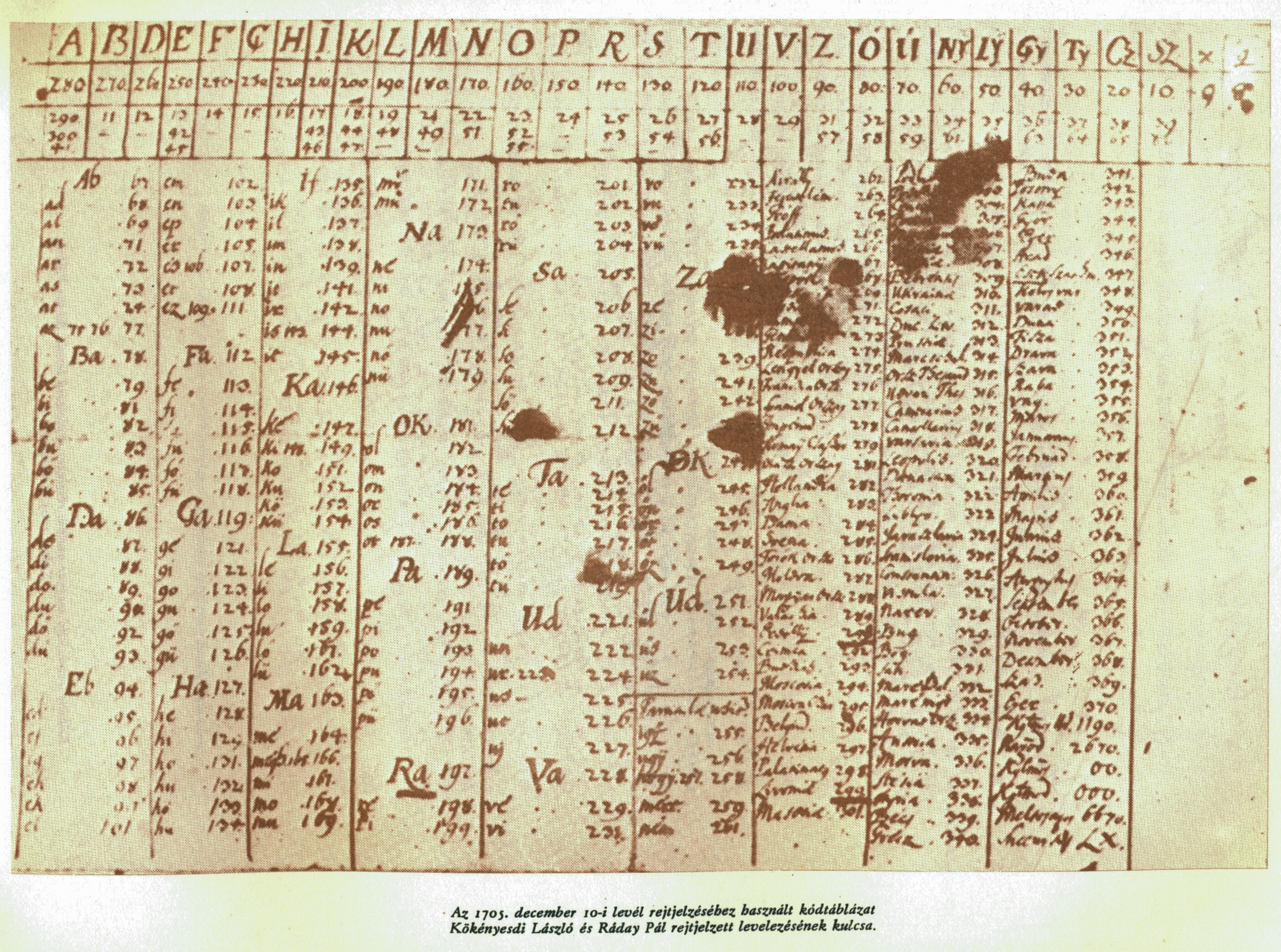 Code table of the correspondence between László Kökényesdi and Pál Rádaylabel QS:Len,"Code table of the correspondence between László Kökényesdi and Pál Ráday"label QS:Lhu,"Kódtáblázat Kökényesdi László és Ráday Pál rejtjelzett levelezéséhez"